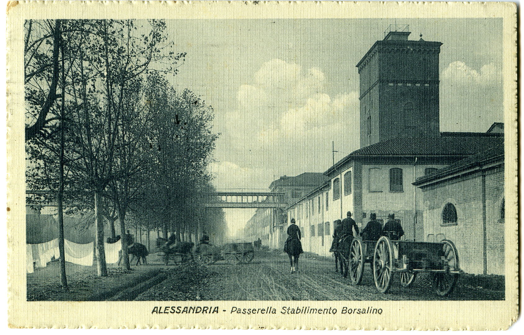 Cartolina d'epoca raffigurante lo stabilimento Borsalino di Alessandria